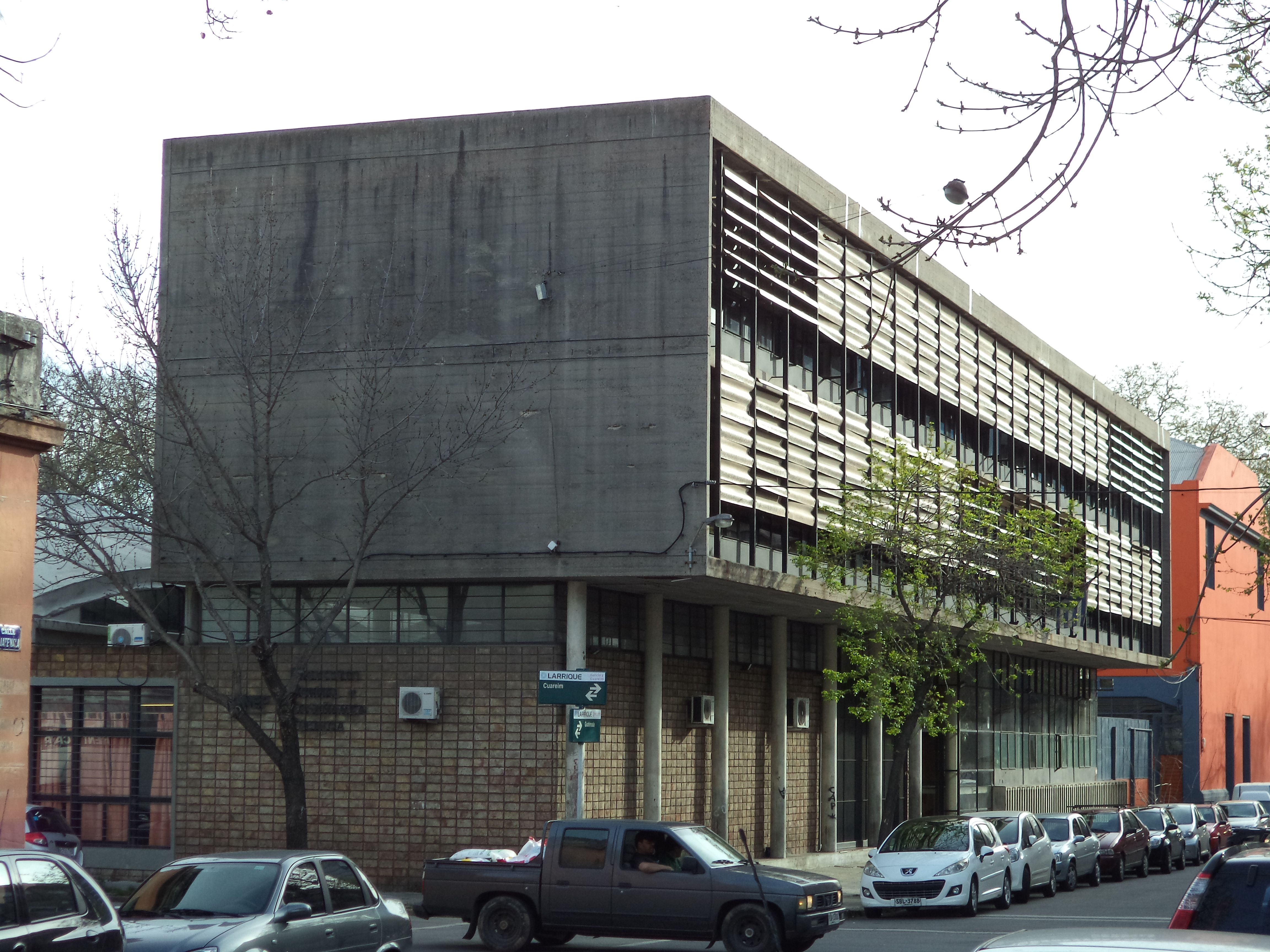 Instituto Normal de Enseñanza Técnica